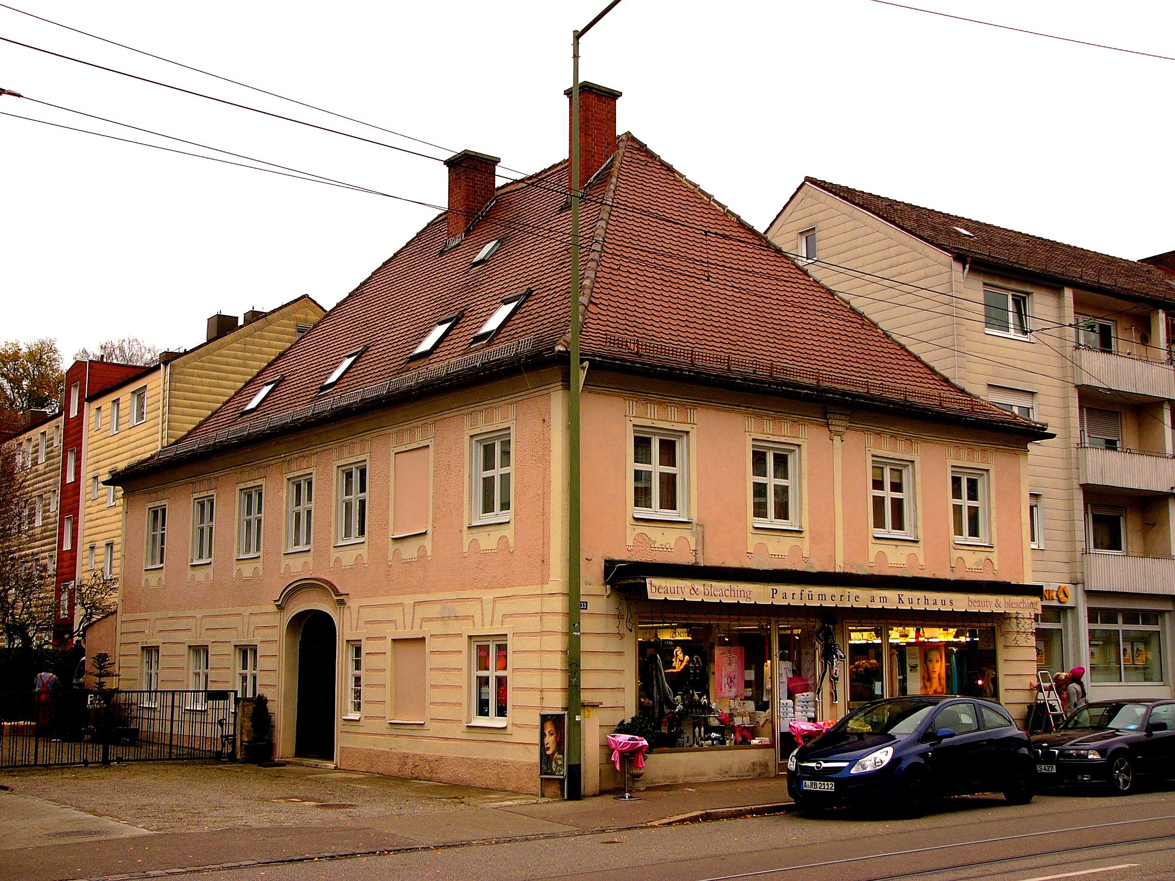 Ehem. Gartengut; jetzt Wohn- und Geschäftshaus, zweigeschossiger Walmdachbau mit korbbogigem Eingang und klassizistischer Putzgliederung, um 1790.This is a photograph of an architectural monument.